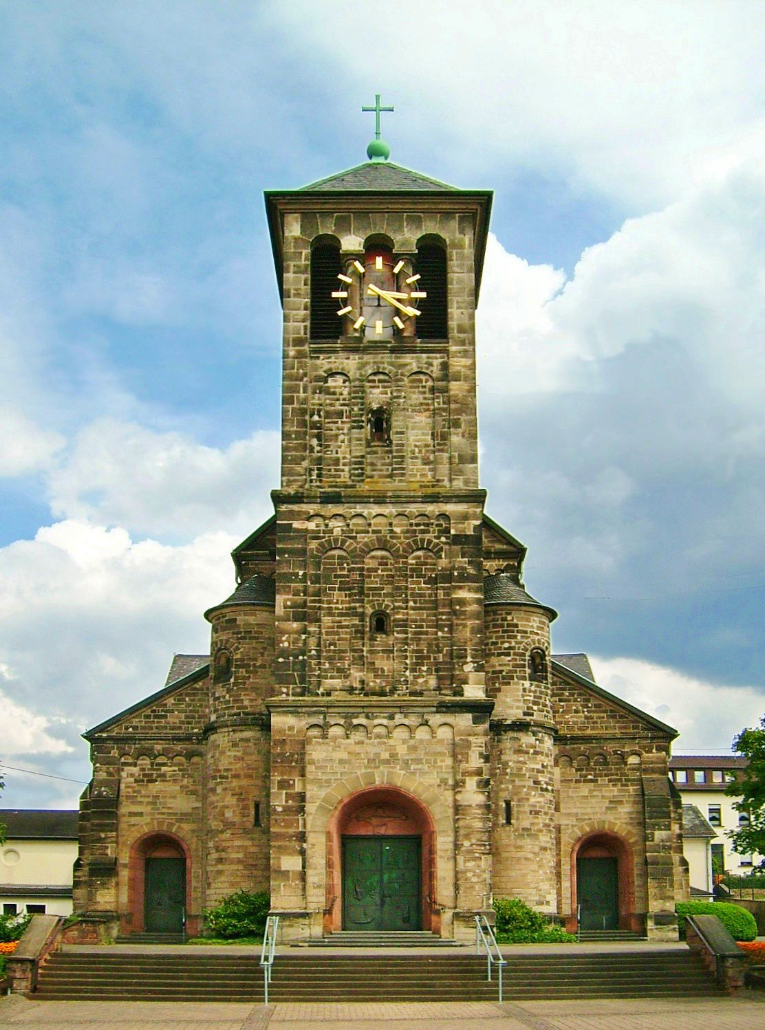 Kirche in Ensdorf Saar